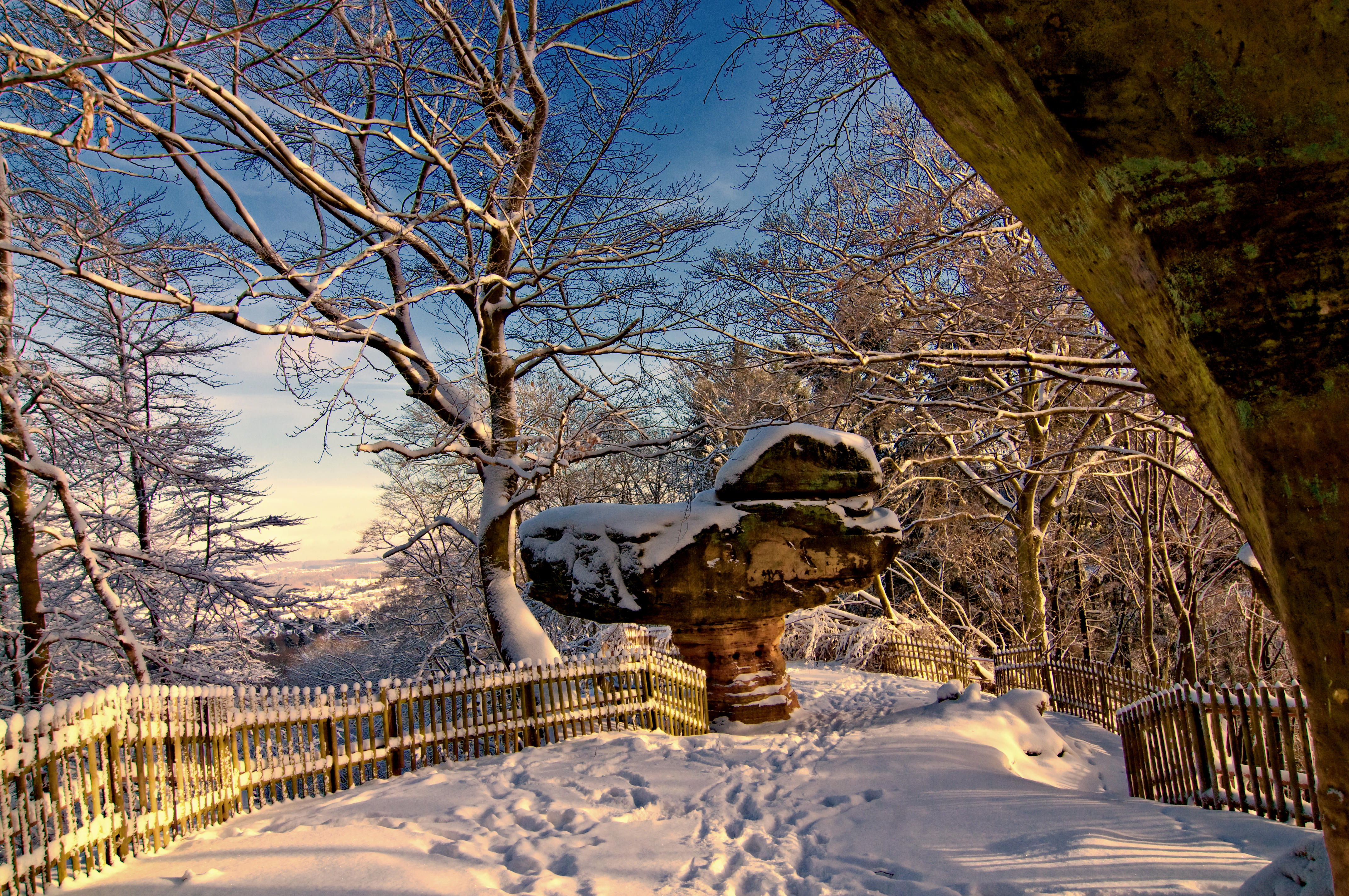 War doch glatt einer vor mir da ;)